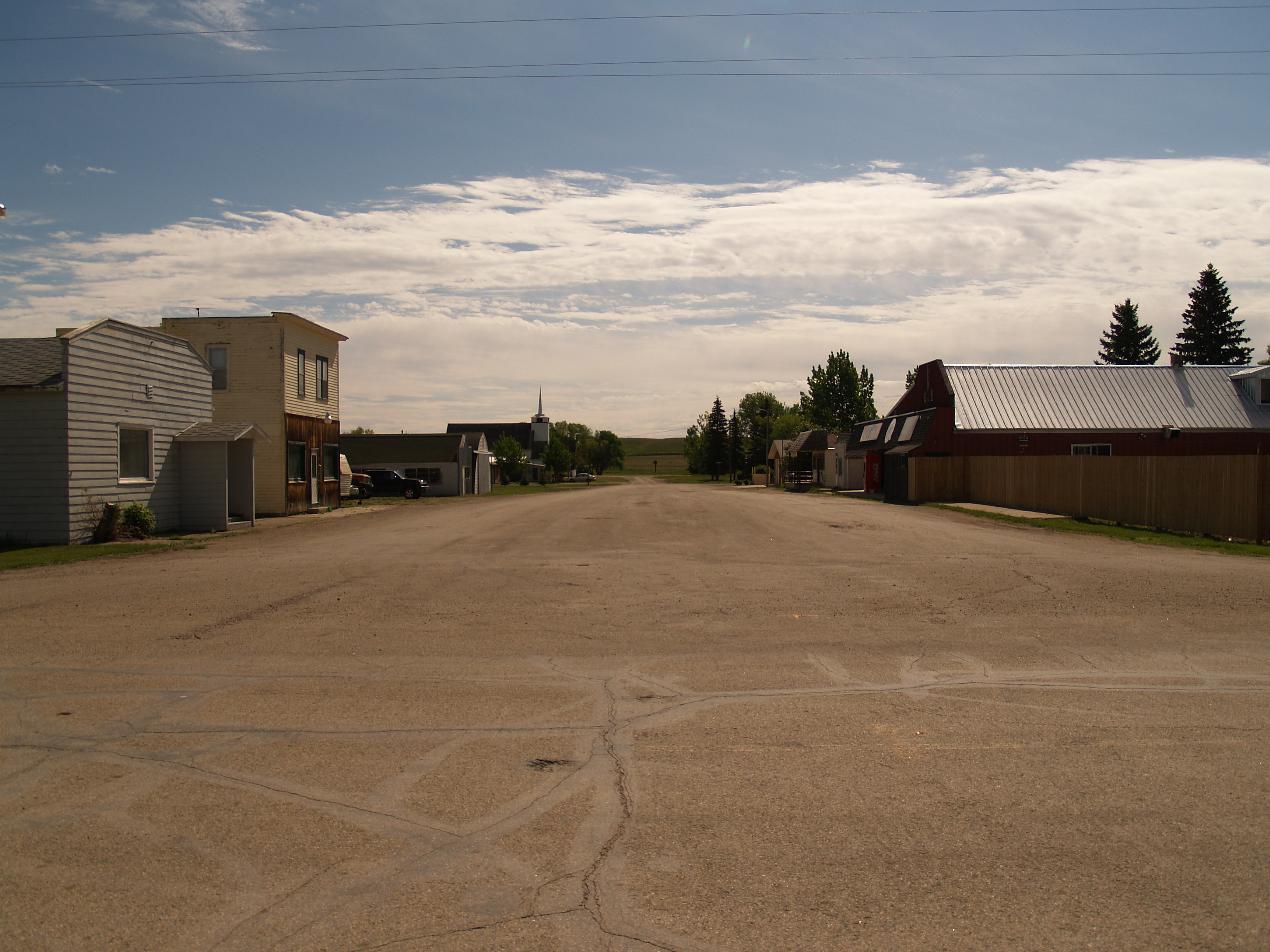 Ypsilanti, North Dakota